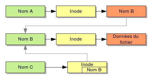 Les différents moyens de stocker les liens symboliques par les système de type Unix.